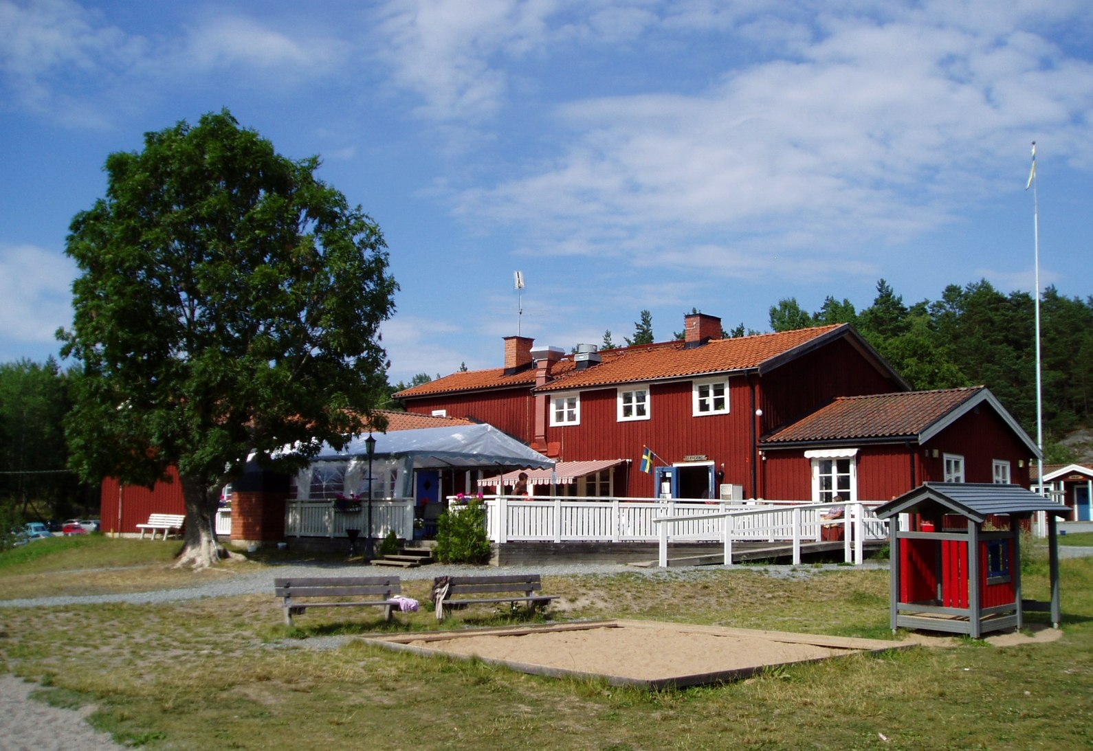 Domaruddens kurs- och friluftsgård, Österåkers kommun